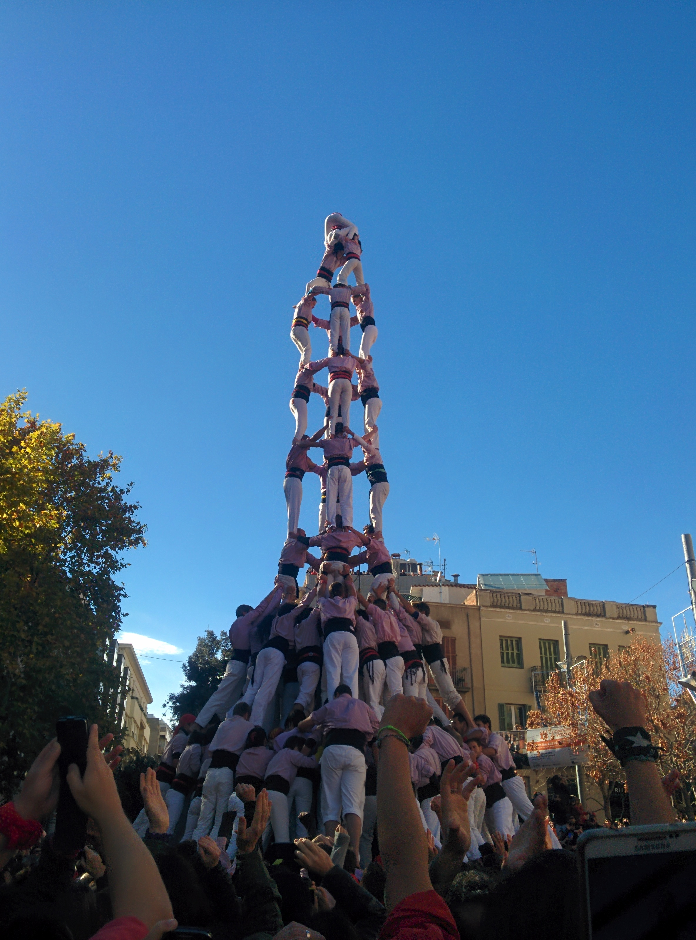 Primer 4 de 10 amb folre i manilles de la història. Descarregat pels Minyons de Terrassa a Terrassa el 22-11-2015.